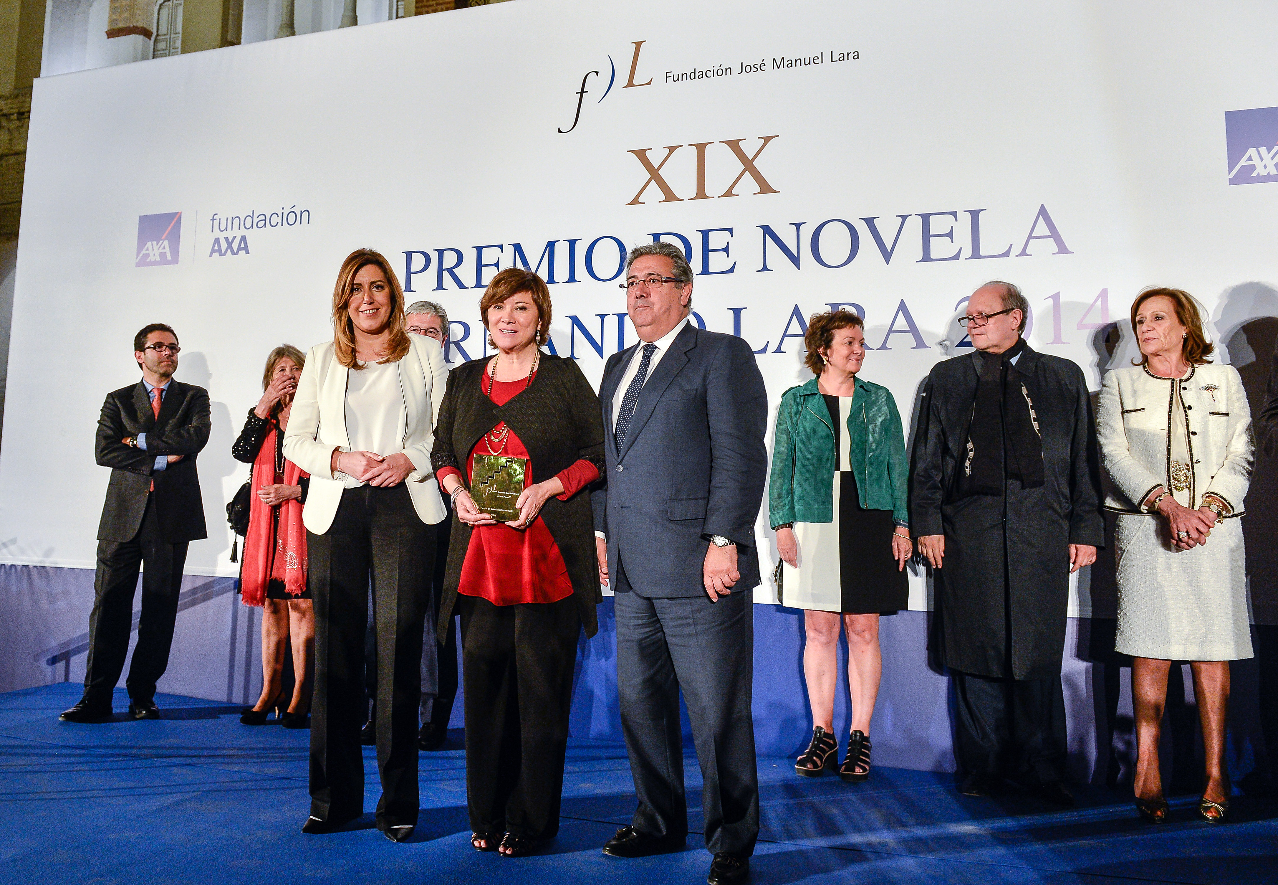 Entrega del Premio Fernando Lara de Novela 2014 a la escritora Nativel Preciado, en presencia del alcalde de Sevilla, Juan Ignacio Zoido, y la presidenta de la Junta de Andalucía, Susana Díaz.